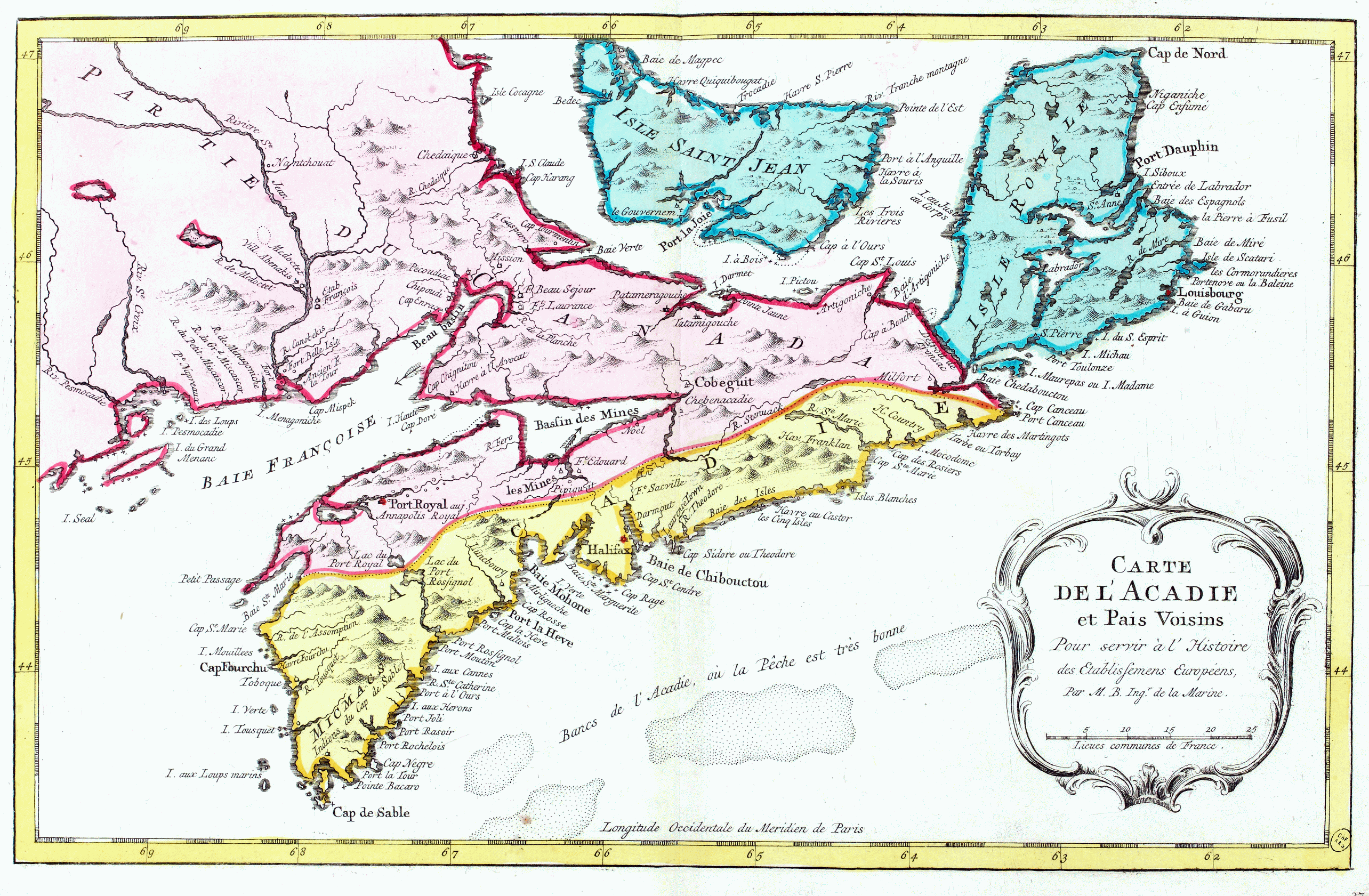 Carte N° 37 : Acadie